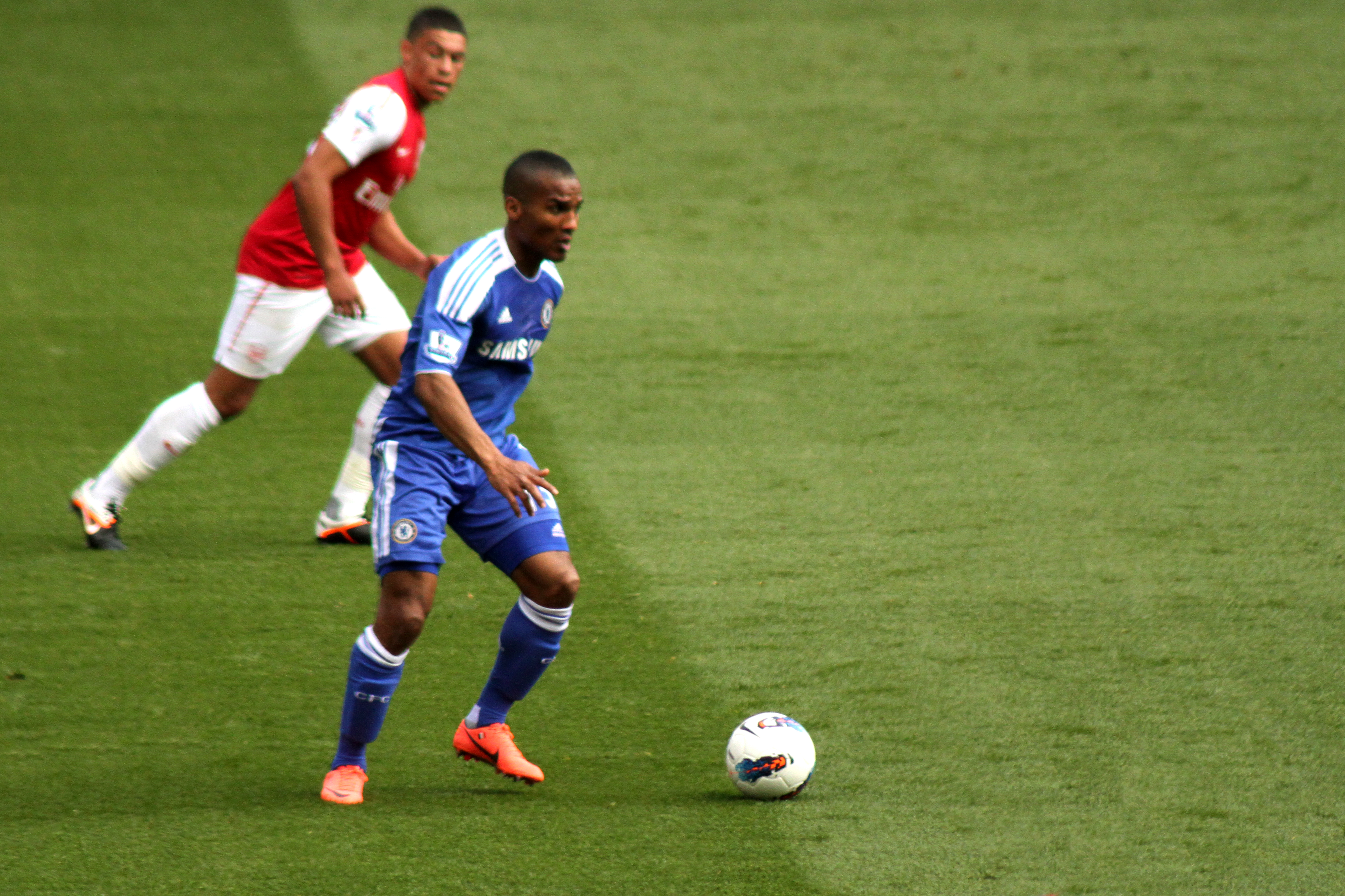 Florent Malouda, Arsenal vs Chelsea, April 2012